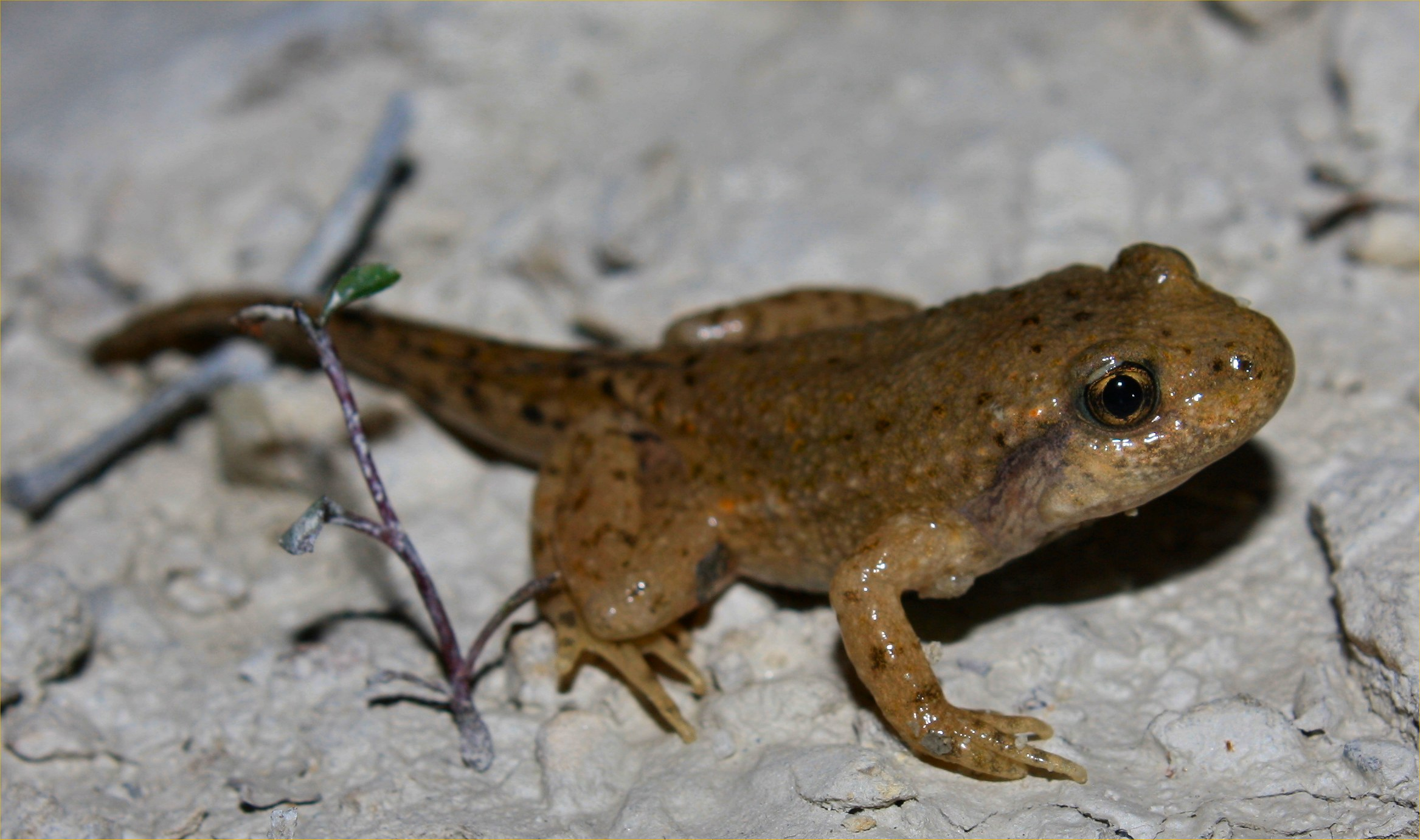 Metamorphe Geburtshelferkröte